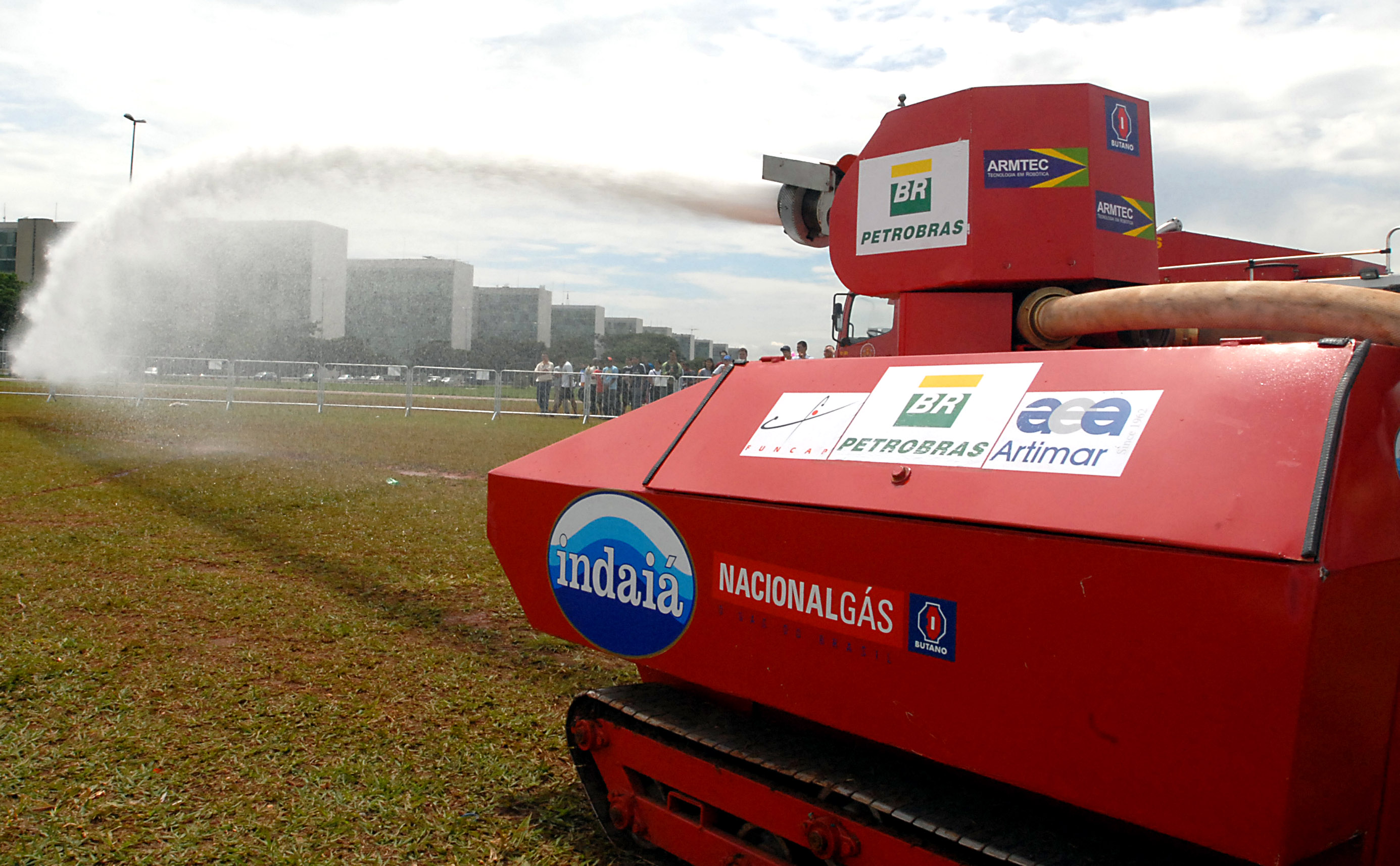 Bombeiros Distrito Federal